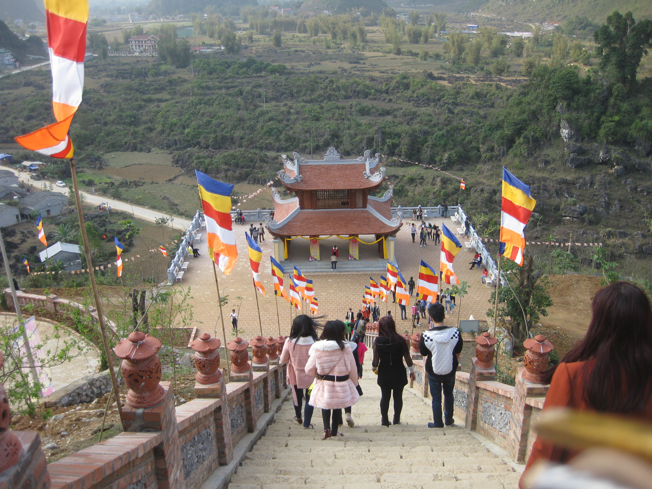 Quang cảnh chùa Phật Tích Trúc Lâm bên thác Bản Giốc, 2015.